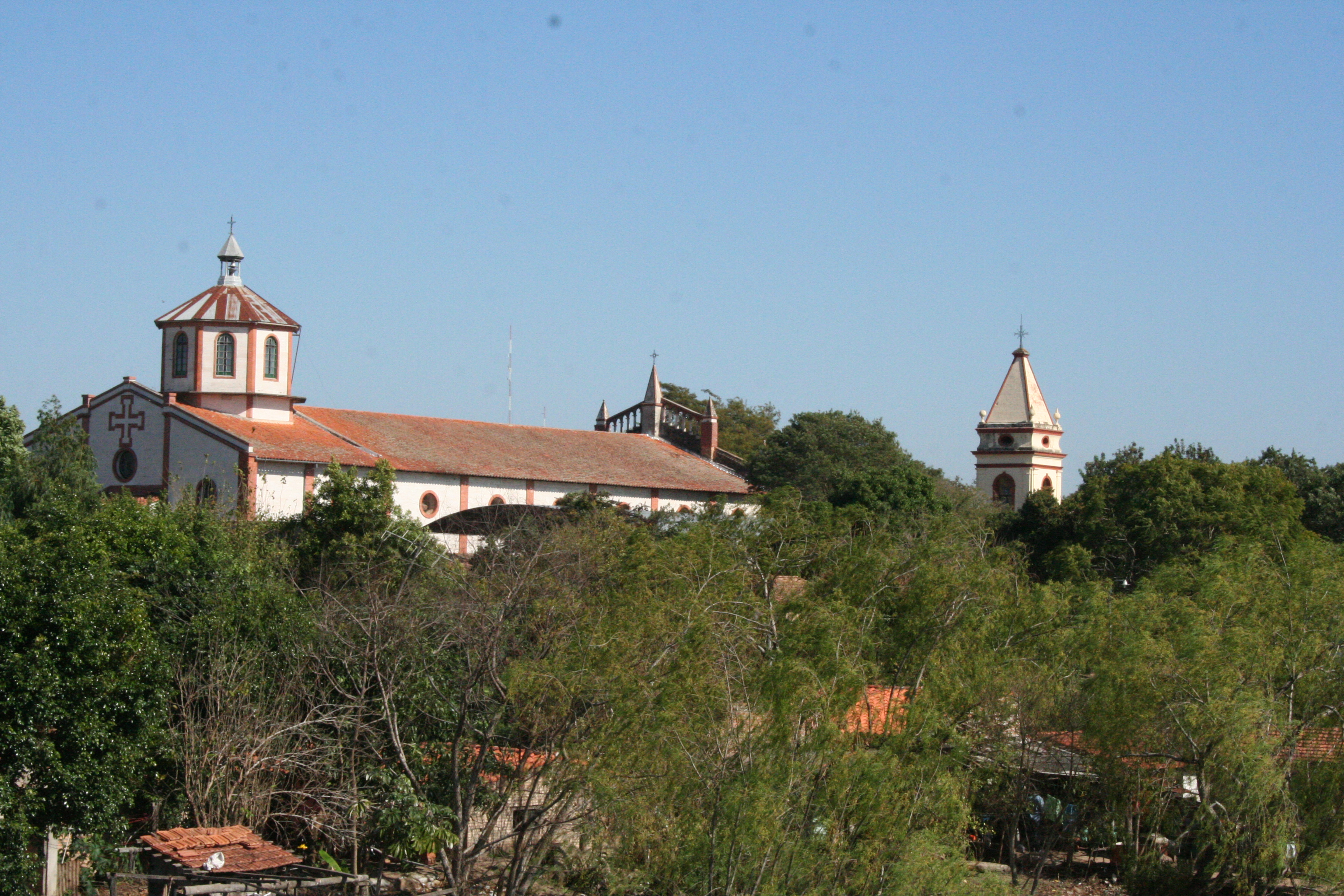 IGLESIA